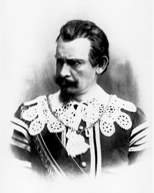 Friedrich Mitterwurzer als Wallenstein, Rollenbild